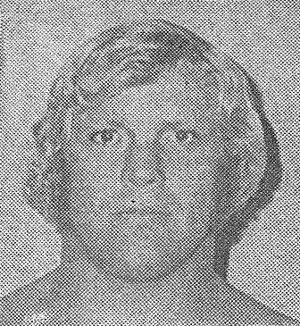 Alfred Hayes en p.2 du programme de catch du St Louis Wrestling Club du 27 décembre 1975